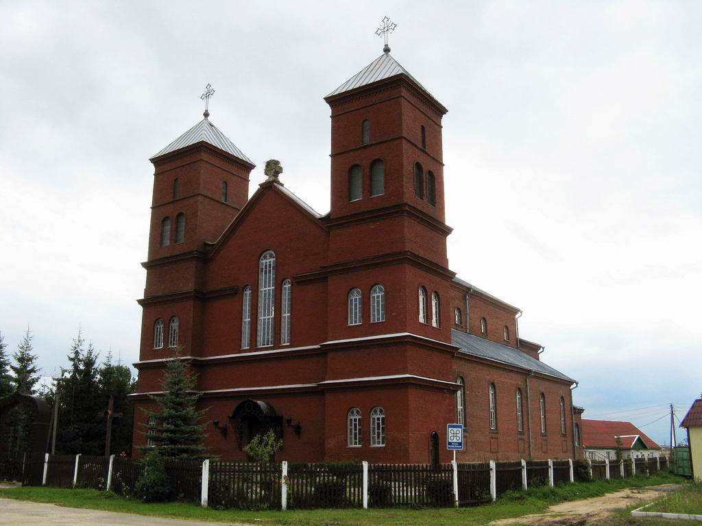 Беларуская (тарашкевіца): Празарокі